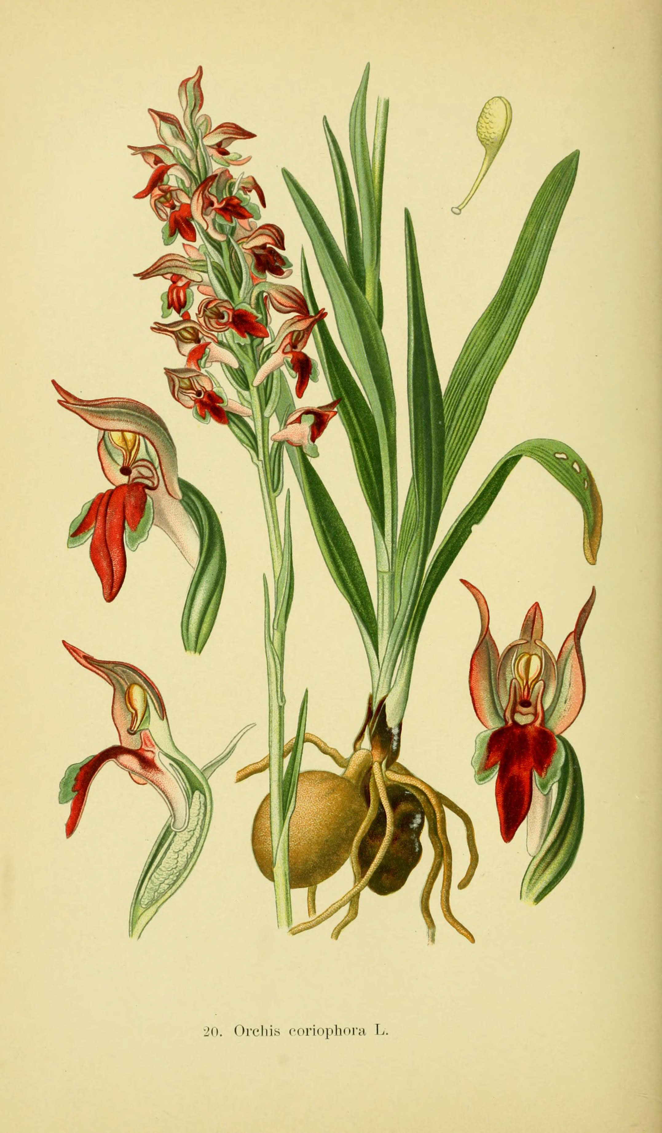 20. Orchis coriopliora L.